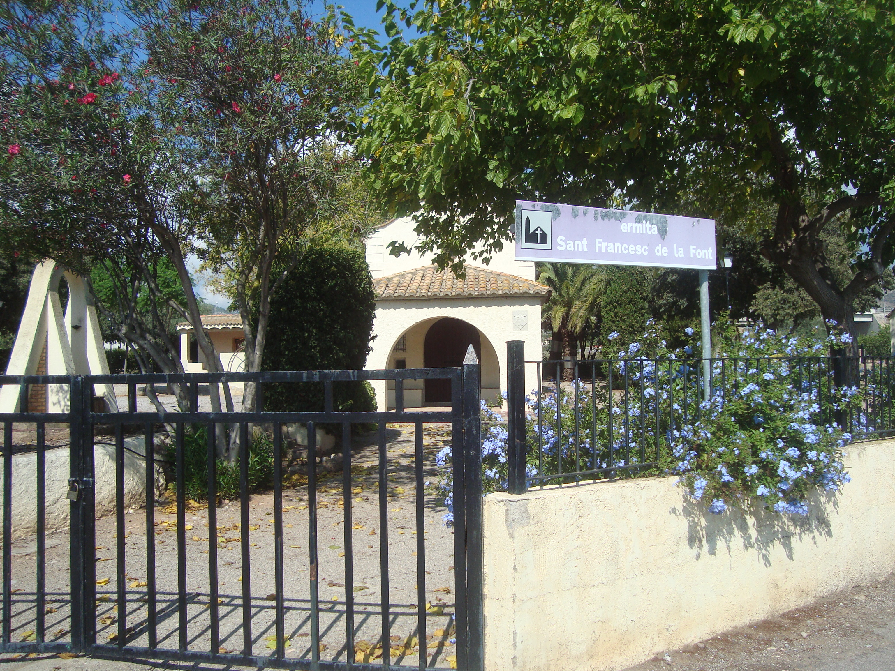 Ermita de Sant Francesc de la Font (Castelló de la Plana) 05.040-011.